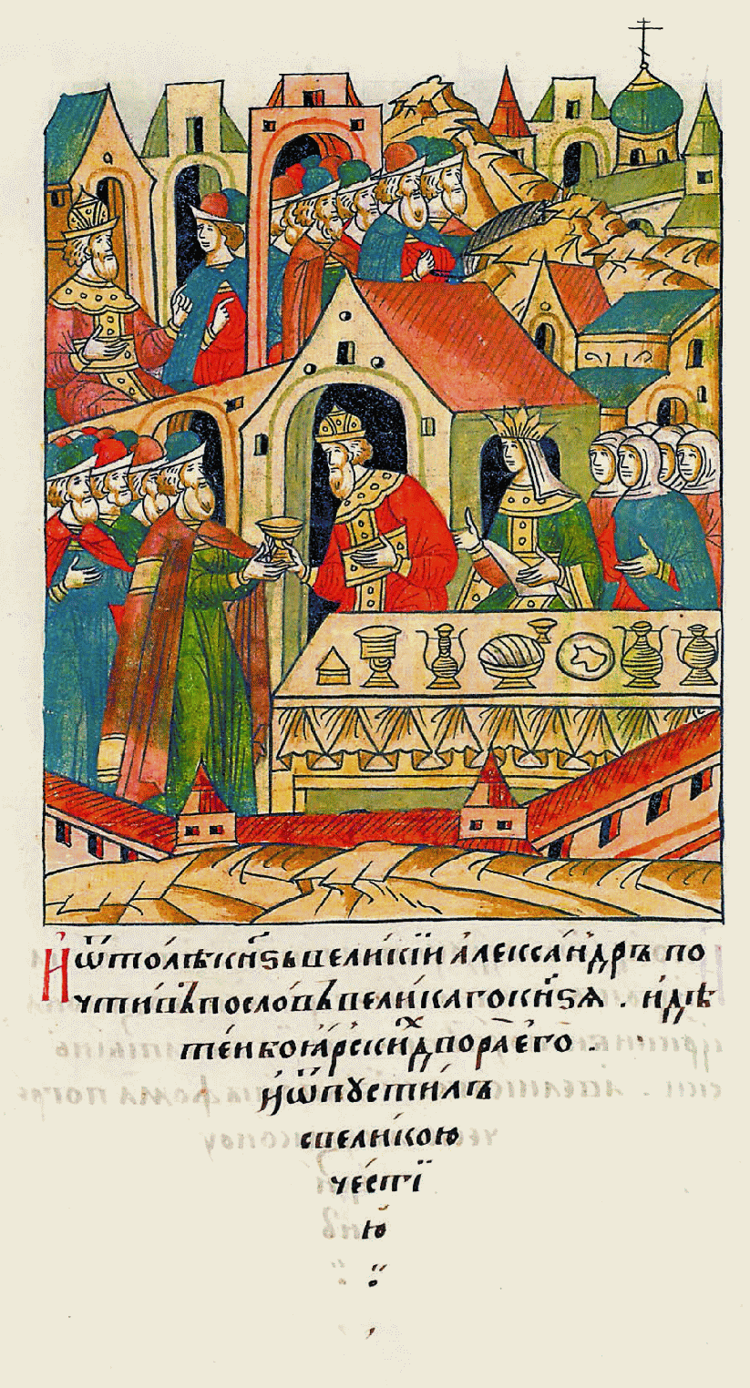 И оттуда великий князь Алек- сандр, почтив послов великого князя и боярских детей его двора, отпустил их с великими почестями.